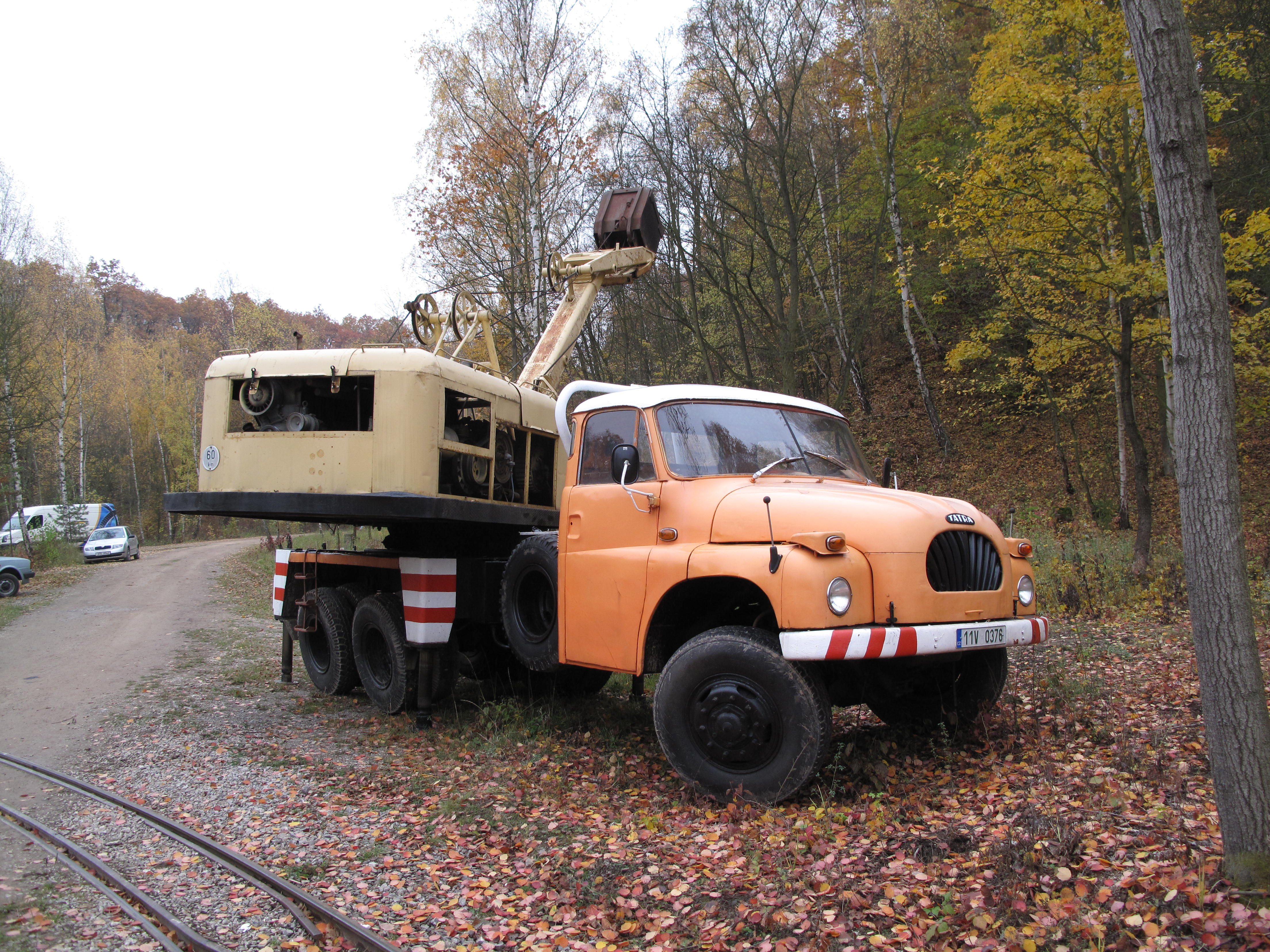 Solvayovy lomy